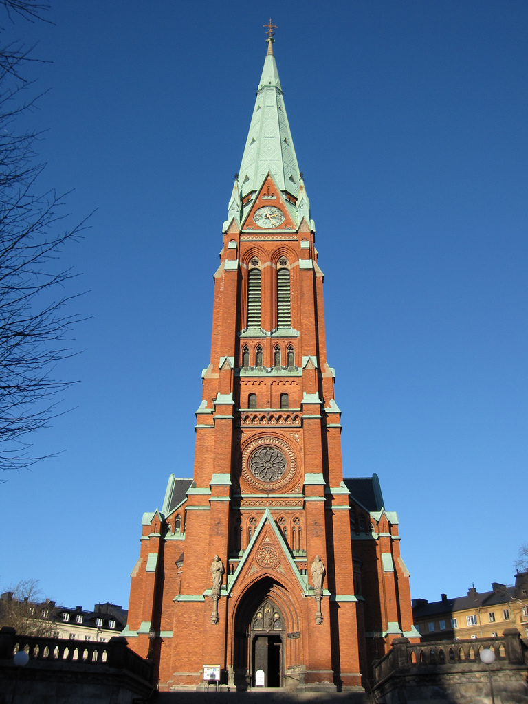 Johannes church, Stockholm